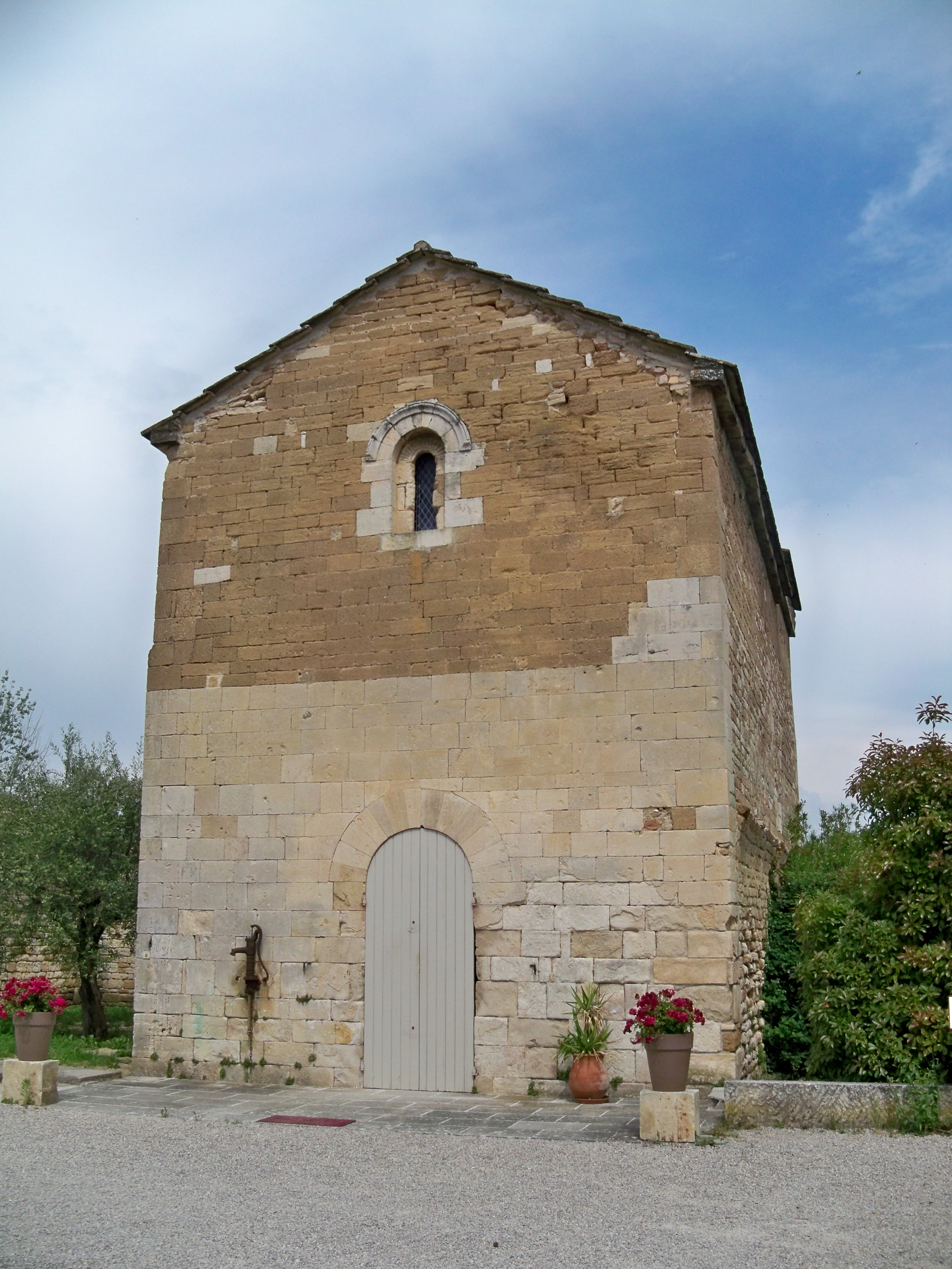 Chapelle Saint-Sixte d'Aubignan, Route de Caromb (Inscrit, 1984) .